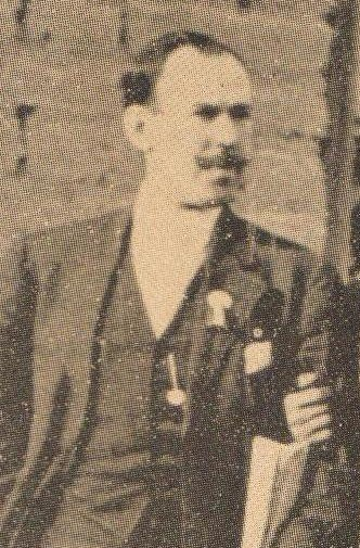 Federico González Garza